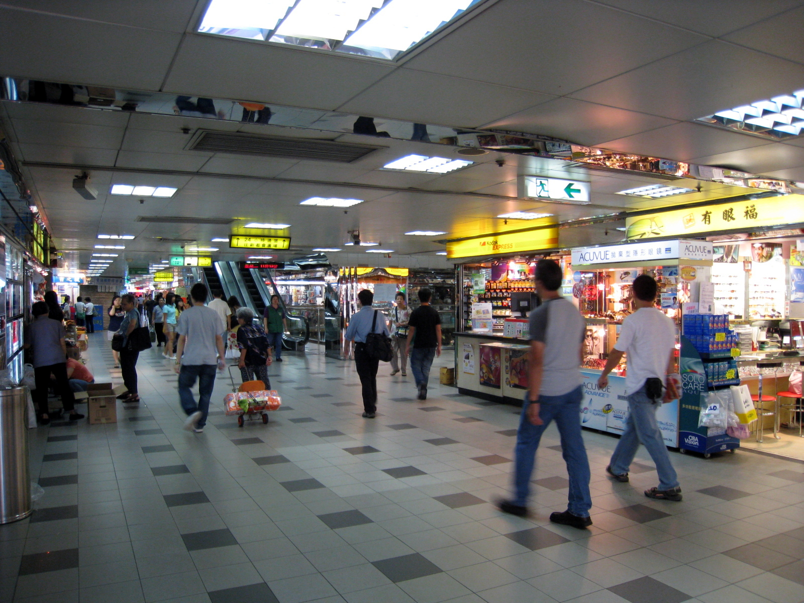 Kwai Chung Plaza_Level 2 Shops